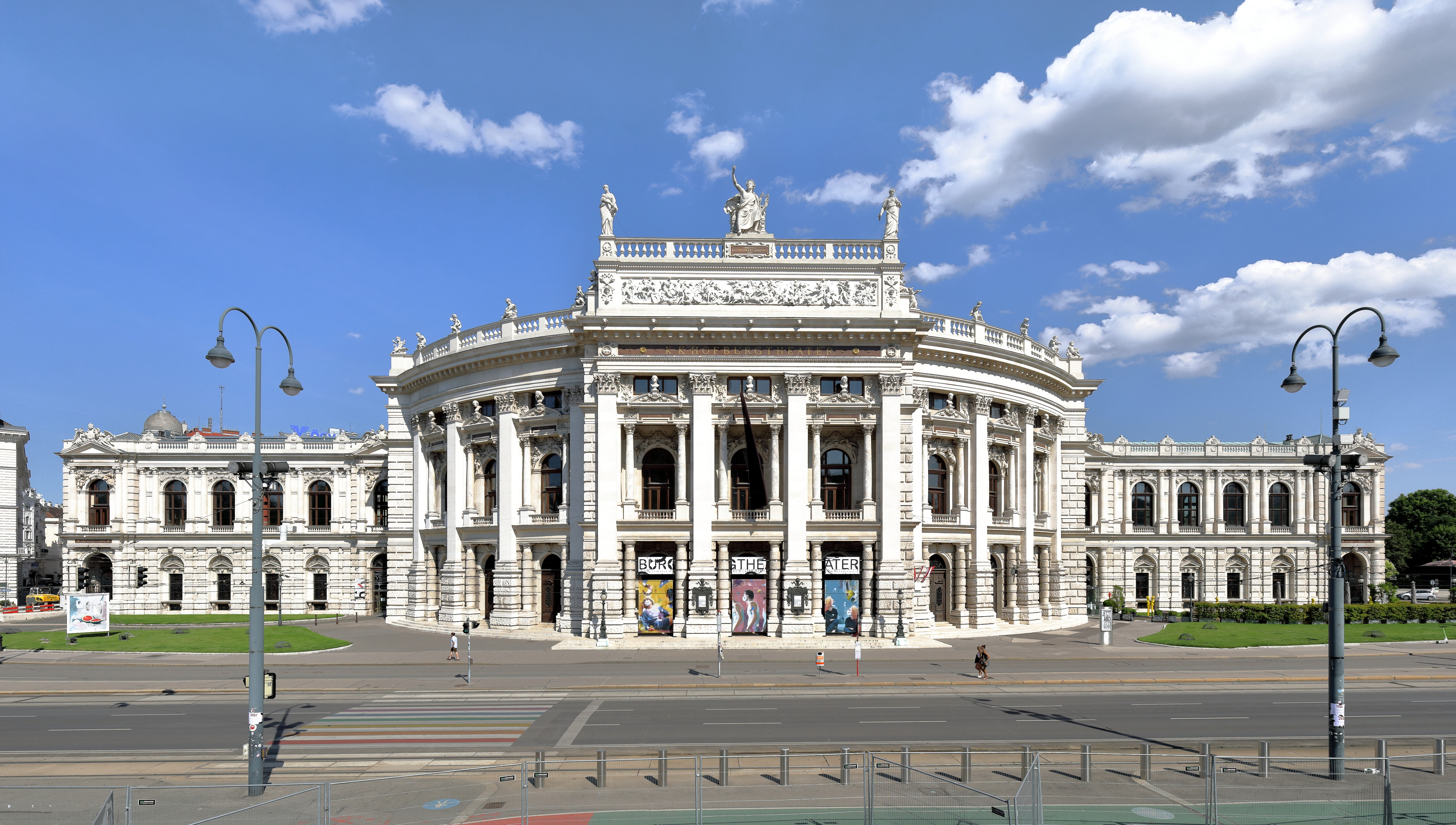 Westansicht des Burgtheaters im 1. Wiener Gemeindebezirk Innere Stadt.Das Theatergebäude wurde nach Plänen von Gottfried Semper und Carl von Hasenauer (Innengestaltung) errichtet. Der Spatenstich erfolgte am 16. Dezember 1874 und am 14. Oktober 1888 fand mit Franz Grillparzers „Esther“ und Friedrich Schillers „Wallensteins Lager“ die Eröffnung statt. Der Zuschauerraum musste wegen schlechter Akustik 1897 umgebaut werden.